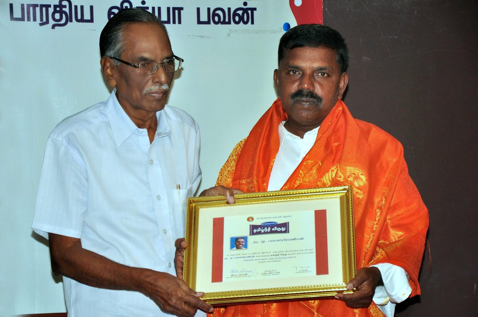 சென்னைக் கம்பன் கழகத் தமிழ்நிதி விருது பெற்றபோது...